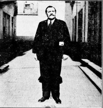 Delzant charles